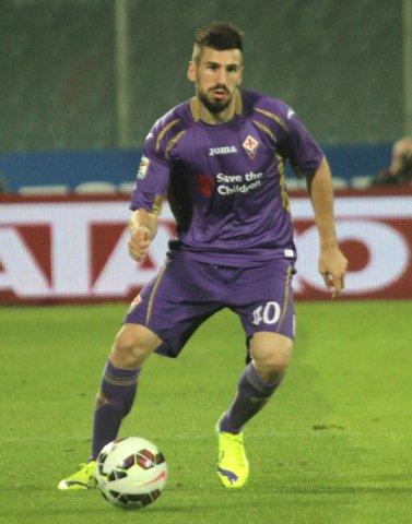 Nenad Tomović (in serbo Ненад Томовић; Kragujevac, 30 agosto 1987) è un calciatore serbo, difensore della Fiorentina e della Nazionale serba. (from it.wp)